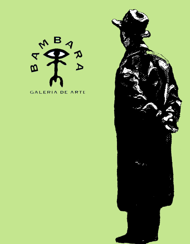 Cuenta el inicio y desarrollo ,como también las lineas de trabajo que lleva esta humilde galería